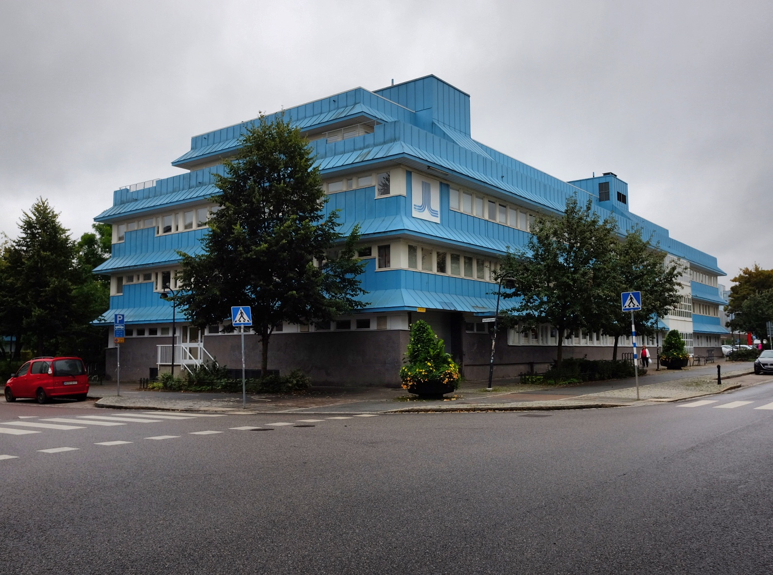 Vård i Upplands Väsby.